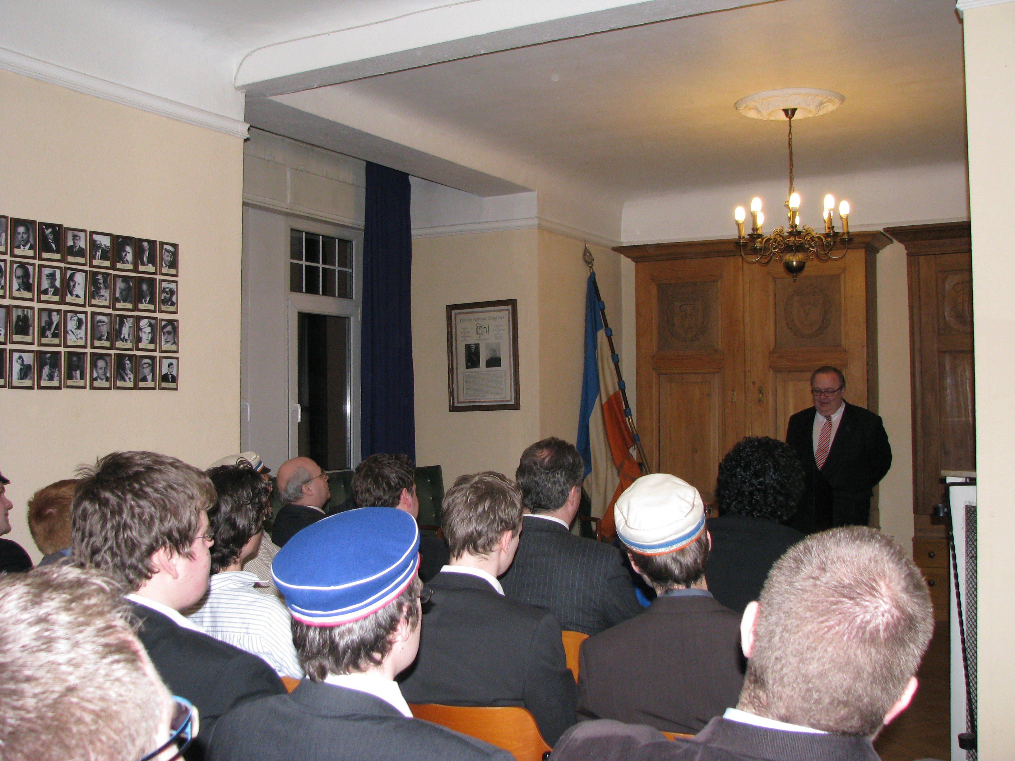 Vortrag des hessischen Sozialministers Jürgen Banzer im WS 08/09